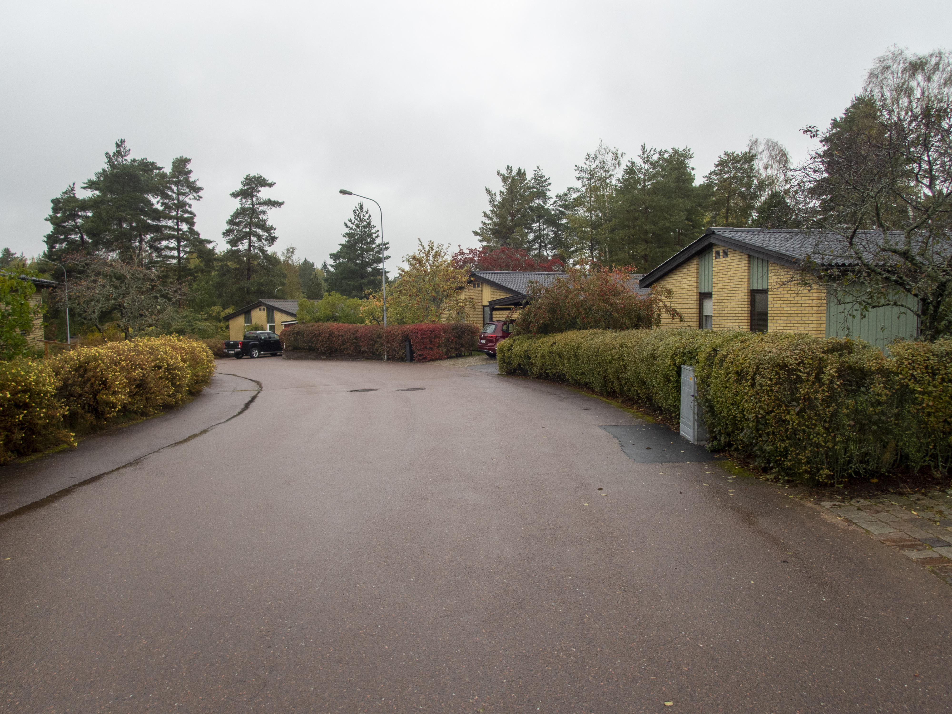 Enplanshus på Elsa Örns väg i Karlstad. Byggnadsår 1976-77 efter ritningar av Olle Dahlén vid Tingvalla arkitektkontor.